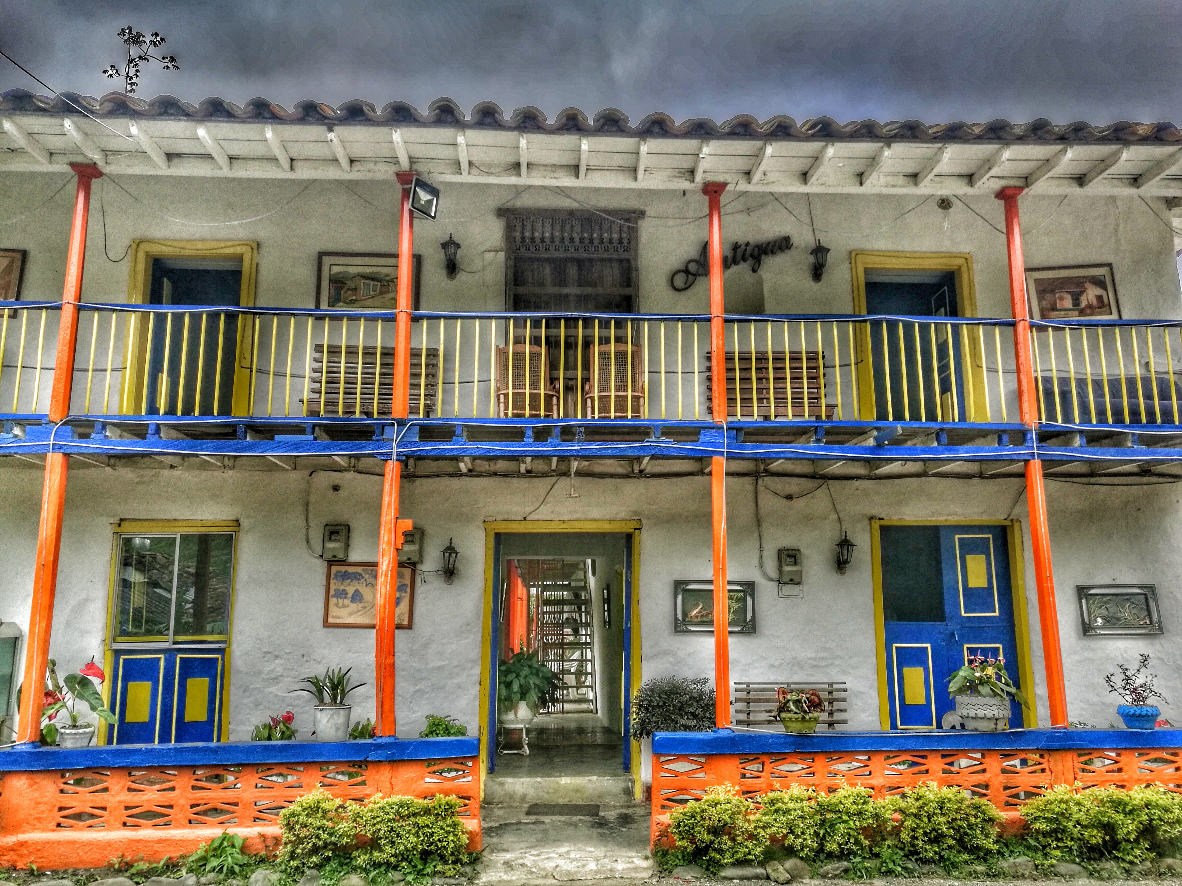 Una de las primeras casas fundadas en El Carmen de Atrato, Chocó, ubicada en el corregimiento de el 7, Foto por: Diego Jiménez